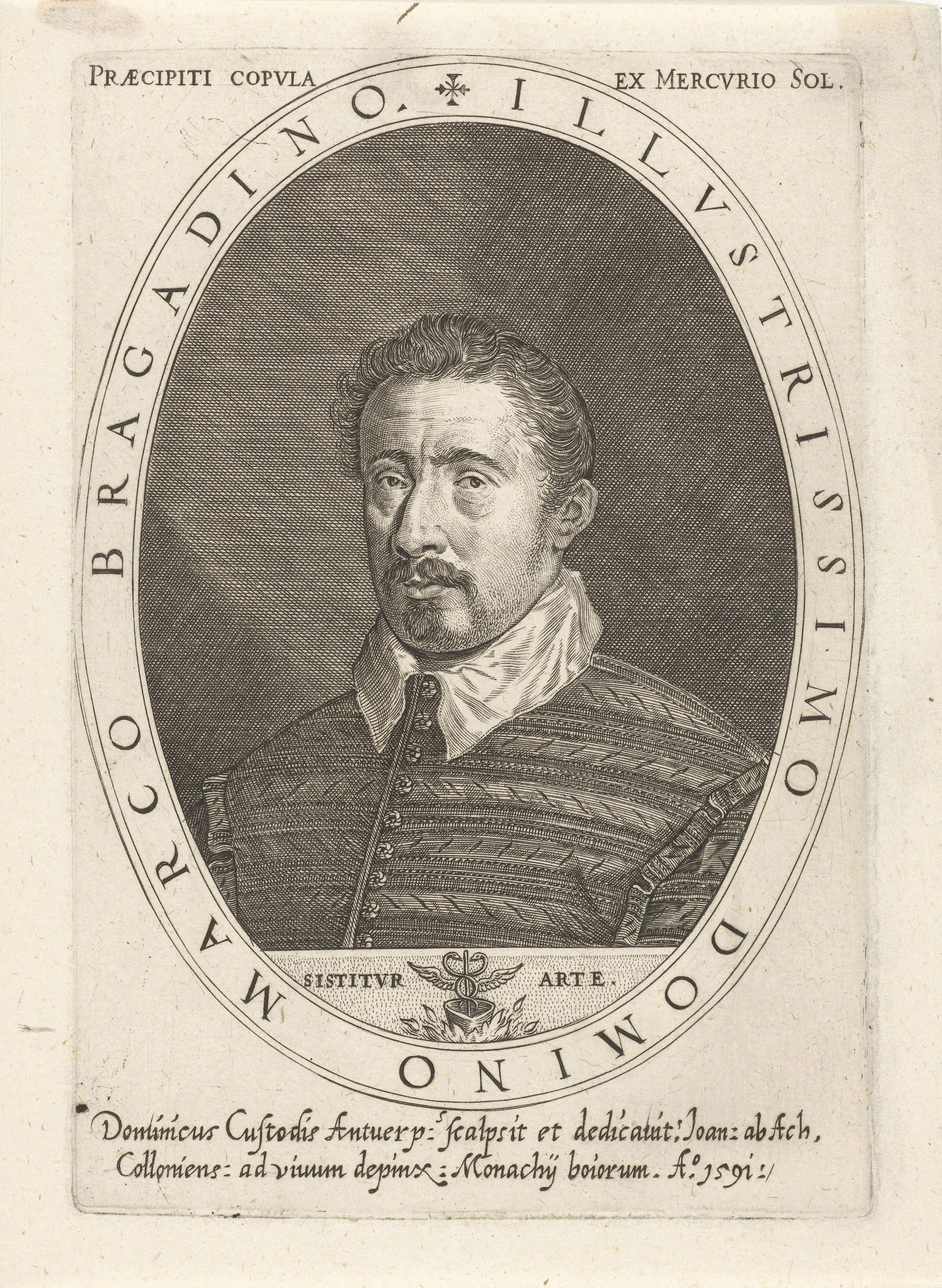 IdentificatieTitel(s): Portret van Marco BragadinoObjecttype: prent Objectnummer: RP-P-1909-4401Catalogusreferentie: LeBlanc 7Opmerking: cat.nr. 7 abusievelijk twee keer toegekend door LeBlancOpschriften / Merken: verzamelaarsmerk, verso, gestempeld: Lugt 2228VervaardigingVervaardiger: prentmaker: Dominicus Custos (vermeld op object)naar schilderij van: Hans von Aachen (vermeld op object)Plaats vervaardiging: BeierenDatering: 1591Fysieke kenmerken: gravureMateriaal: papier Techniek: graveren (drukprocedé)Afmetingen: plaatrand: h 164 mm × b 112 mmOnderwerpWie: Marco BragadinoVerwerving en rechtenVerwerving: aankoop 1905Copyright: Publiek domein